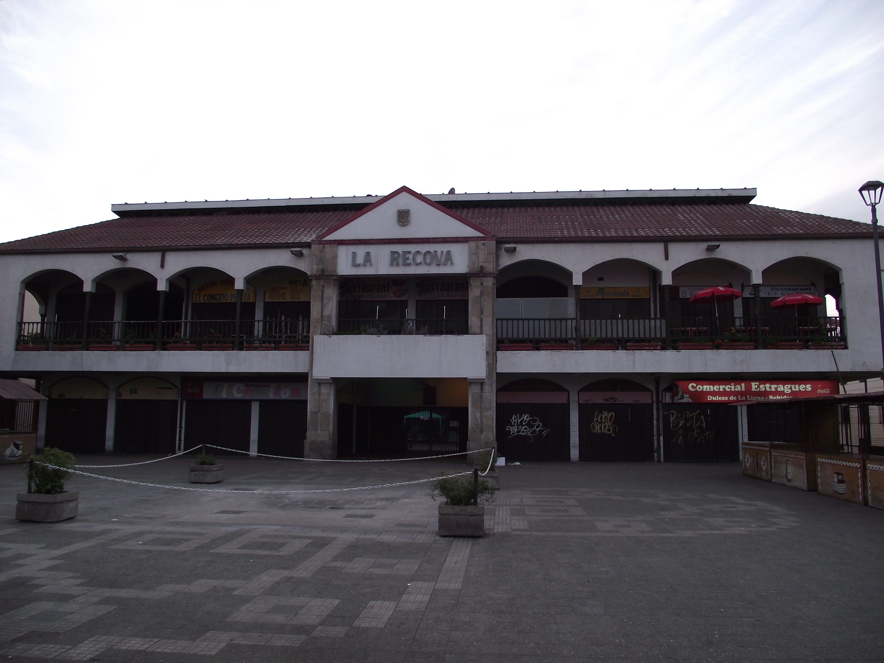 Edificio de La Recova de La Serena.